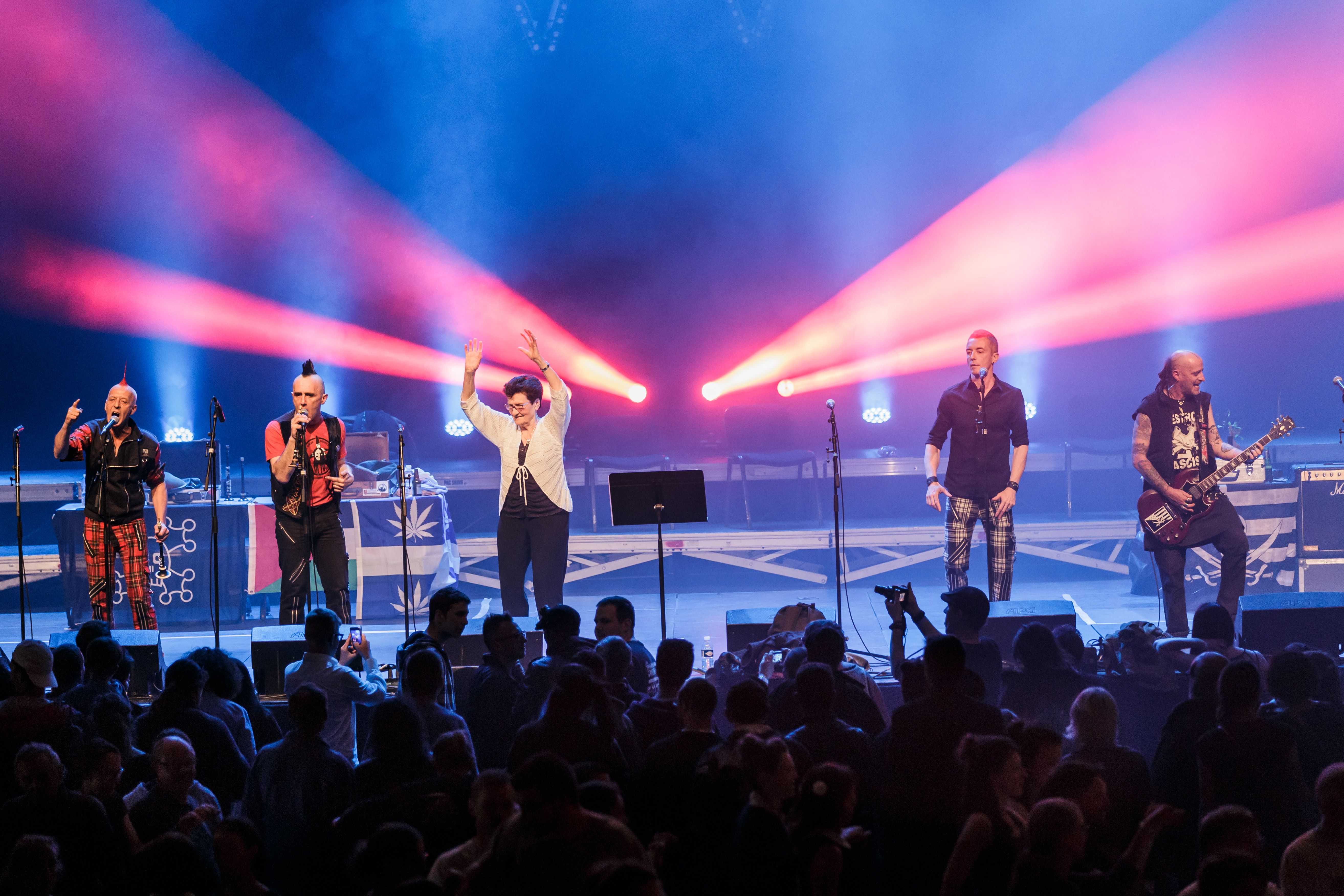 Les Ramoneurs de menhirs et la chanteuse Louise Ebrel en fest-noz au parc des expos de Penvillers à Quimper à l'occasion des 50 ans de la confédération des cercles War'l Leur le 29 avril 2017.